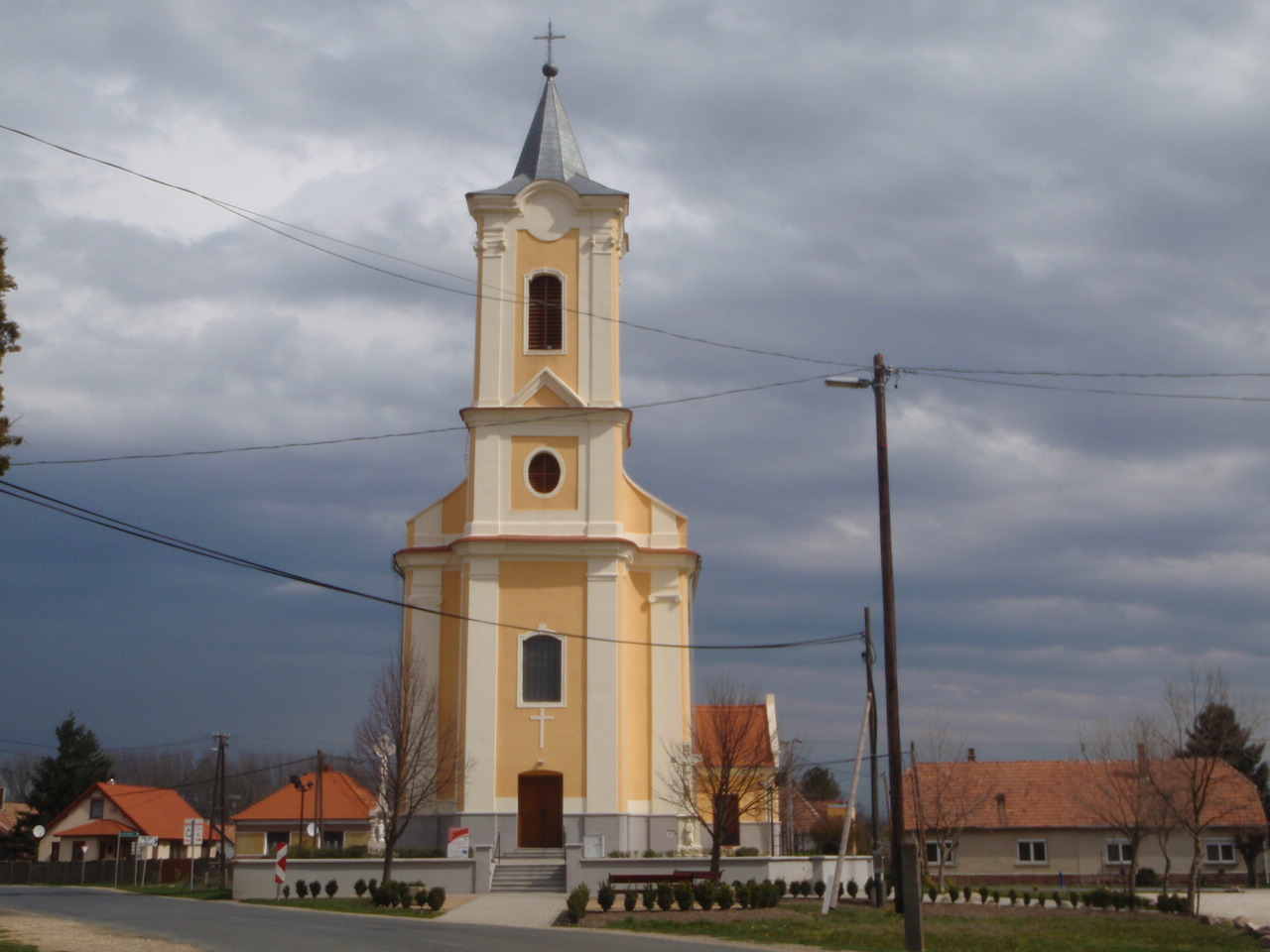 Nick, Szent Anna-templom, műemlék